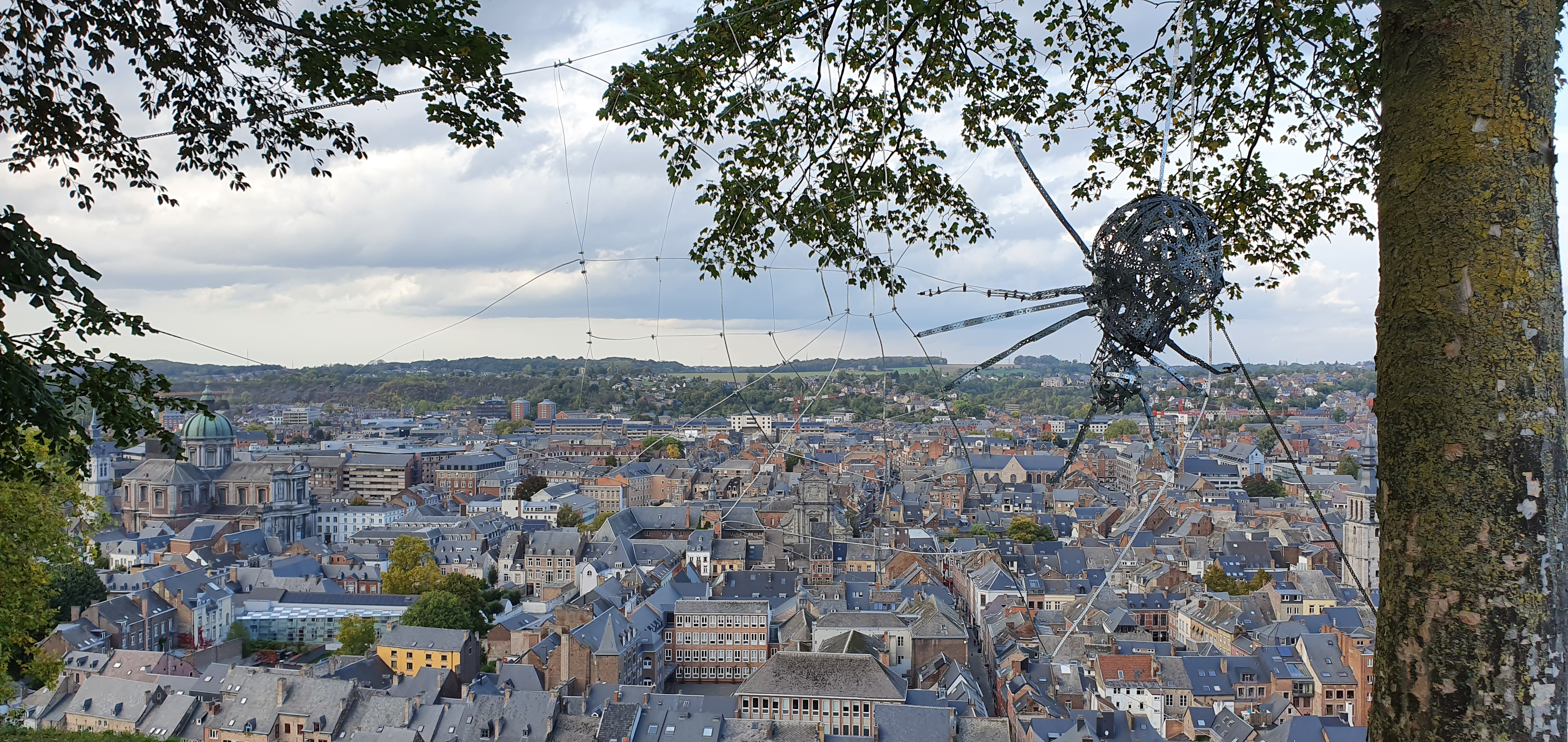 Namur toits